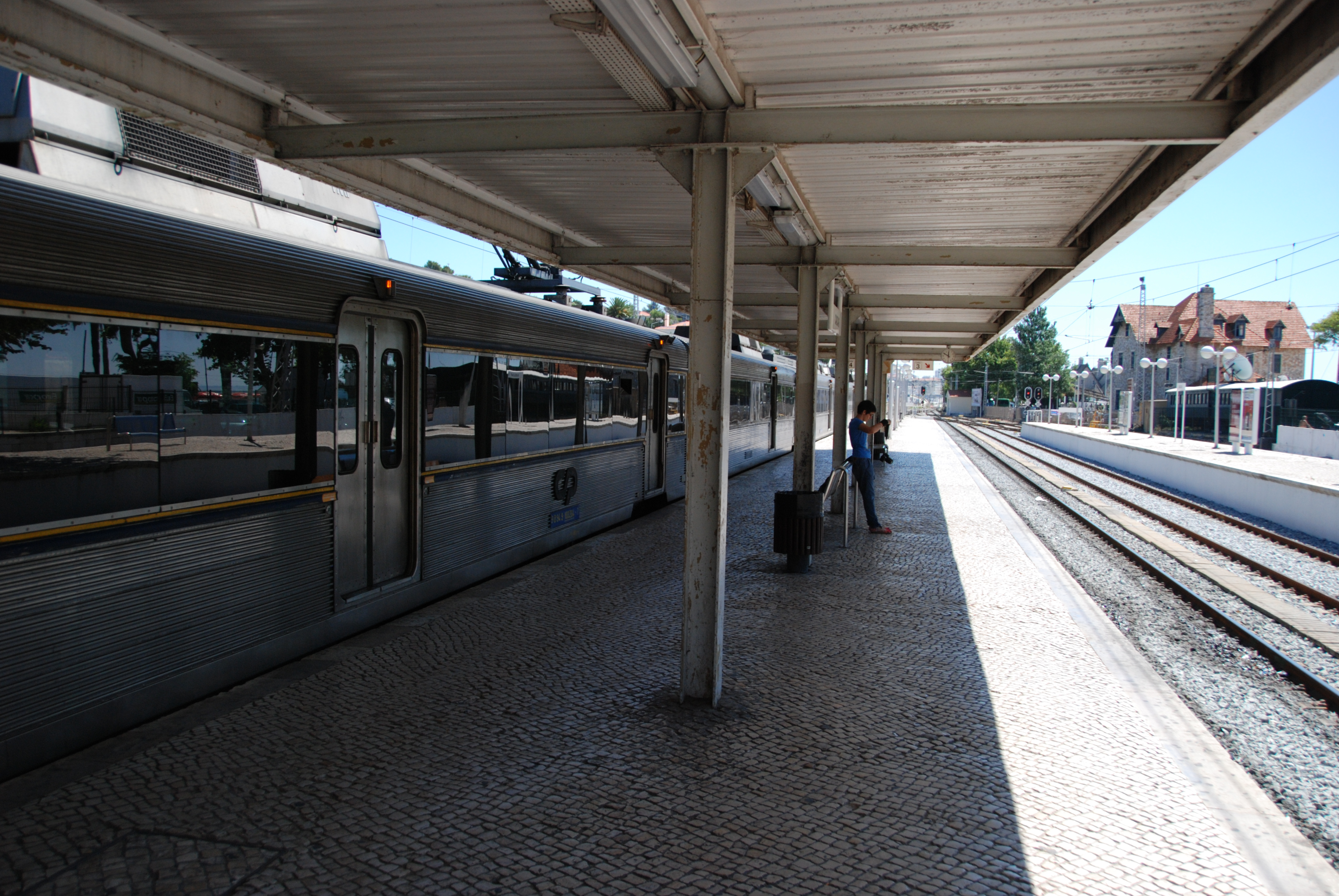 Cascais train station.